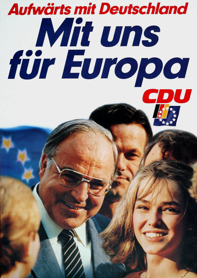 Aufwärts mit Deutschland Mit uns für Europa CDU Abbildung: Kohl im Gespräch mit jungen Leuten Kommentar: Vgl. Plakat Nr. 10-030-110 Plakatart: Motiv-/Textplakat Auftraggeber: CDU-Bundesgeschäftsstelle, Abteilung Öffentlichkeitsarbeit, Konrad-Adenauer-Haus, Bonn Drucker_Druckart_Druckort: Welzel & Hardt, Köln Objekt-Signatur: 10-030 : 142 Bestand: Europawahlplakate (10-030) GliederungBestand10-18: Europawahlplakate (10-030) » Europawahl am 17.6.1984 » CDU Lizenz: KAS/ACDP 10-030 : 142 CC-BY-SA 3.0 DE